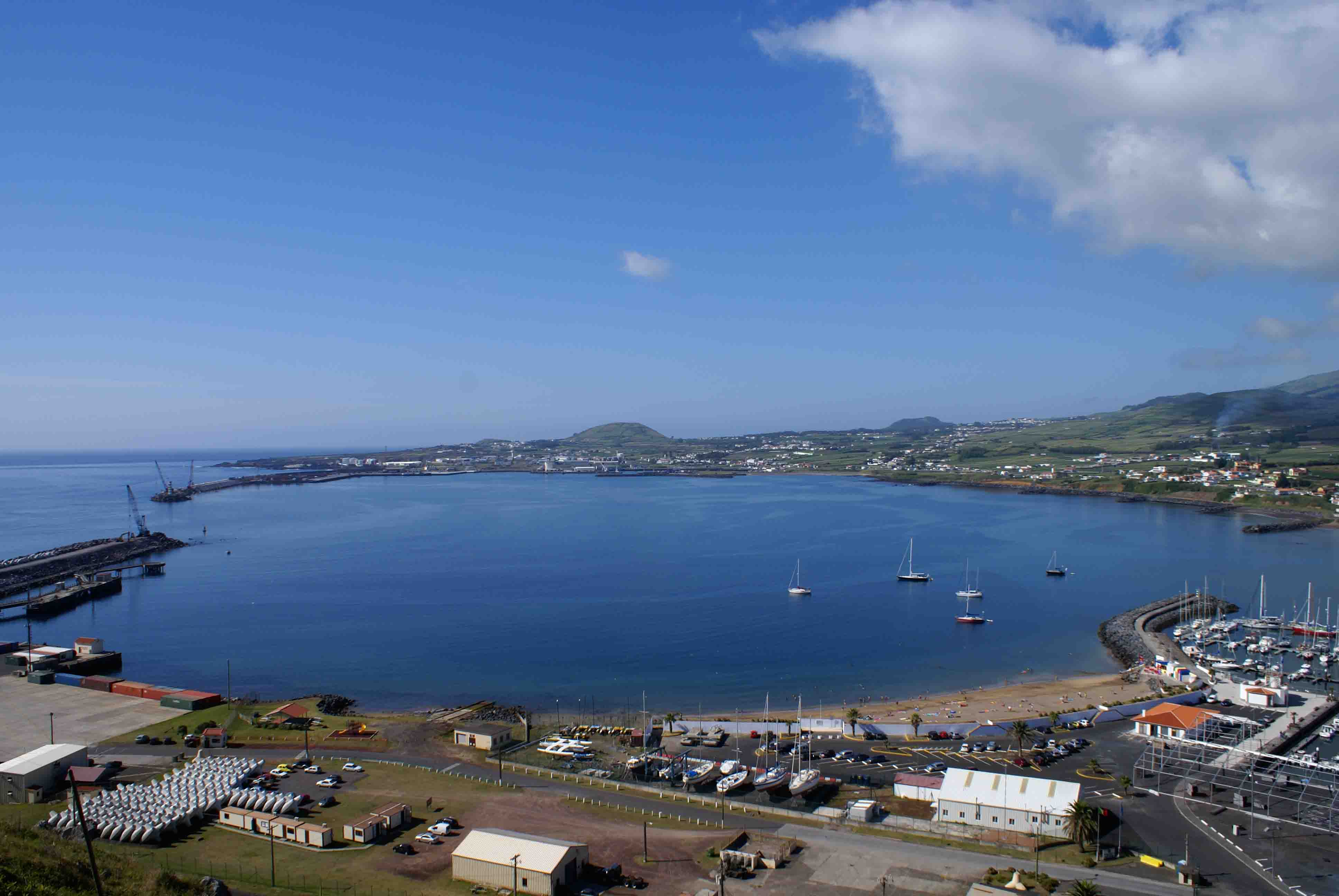 Baía da Praia da Vitória, Prainha (ou Praia dos Americanos, como era denominada anteriormente), ilha Terceira, Açores, Portugal.